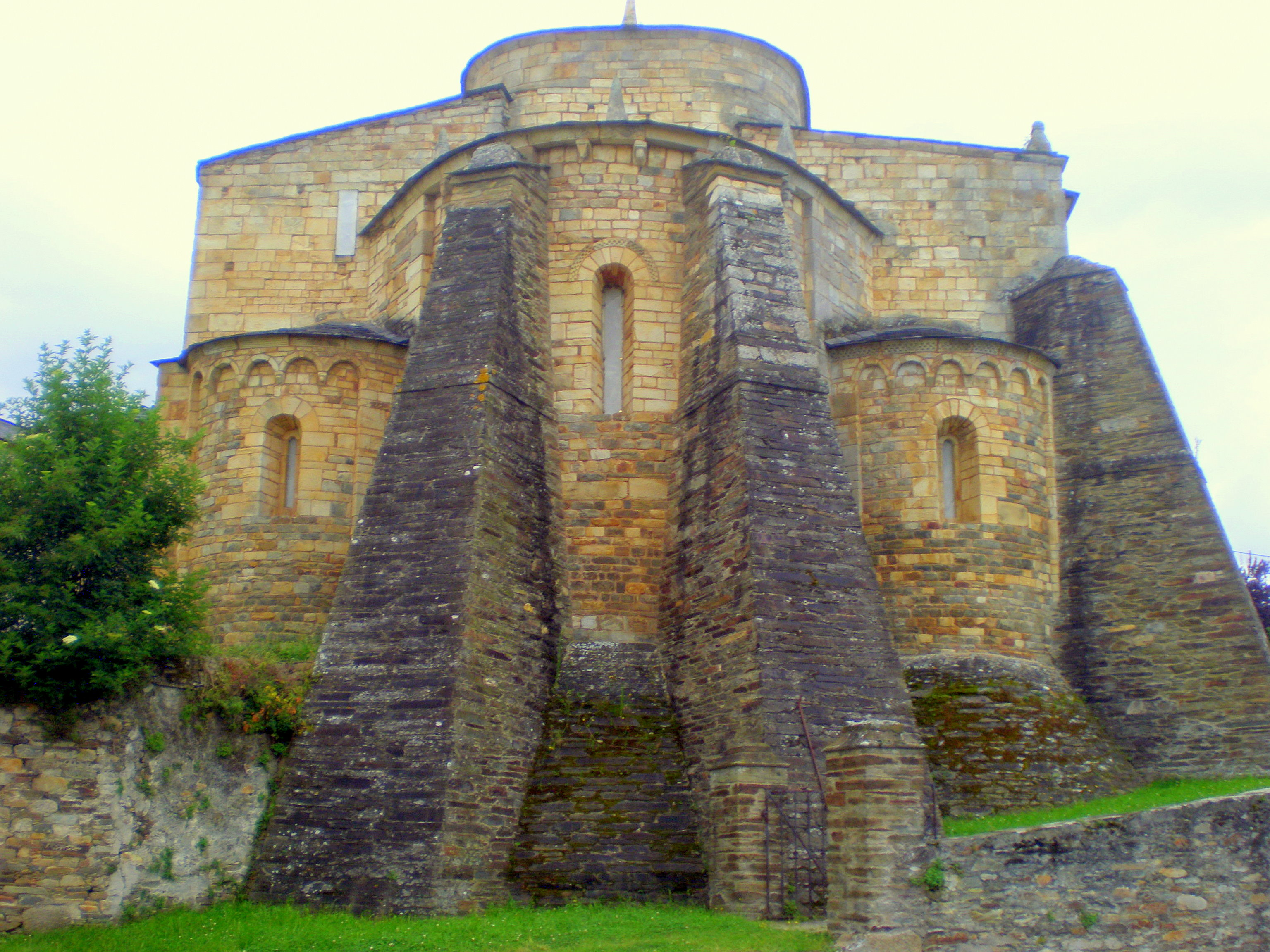 San Martiño de Mondoñedo - Ábside. 2008